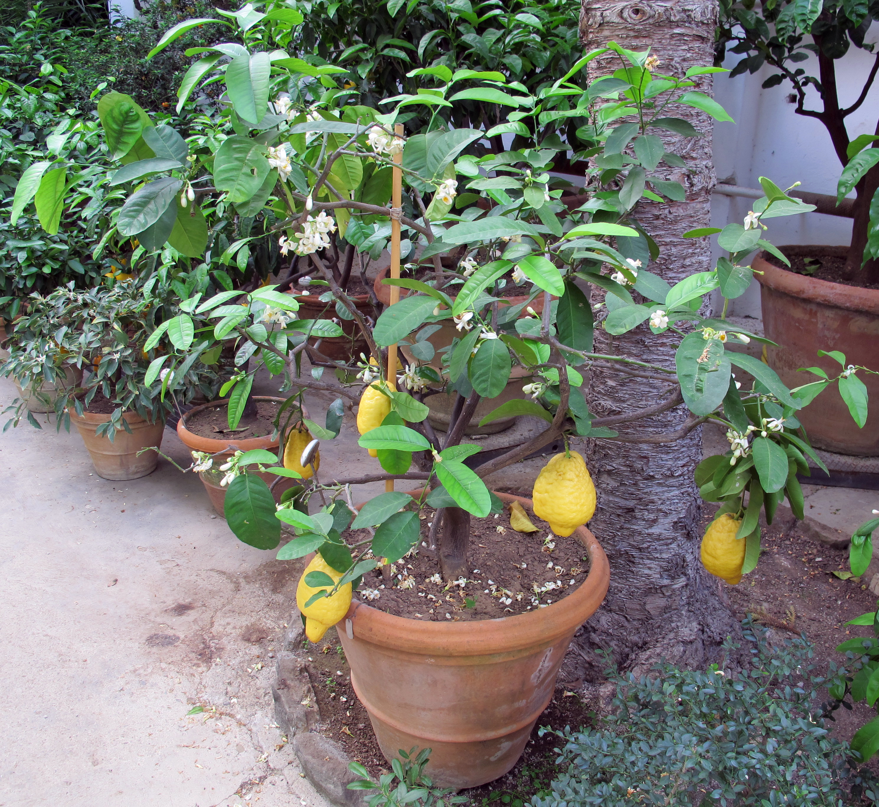 Orto Botanico, Firenze